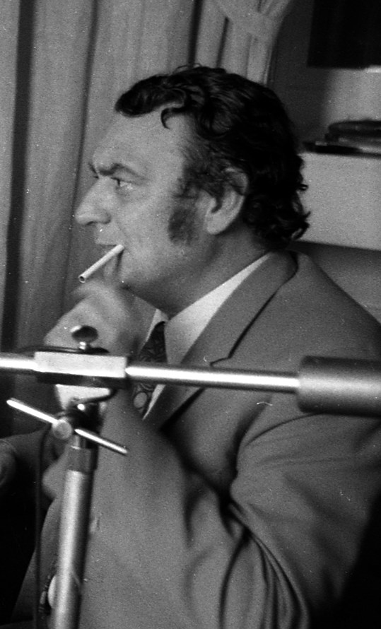 intérieur d'un studio de Sud radio. Le mois de septembre 1972. Vue d'ensemble en plongée de Claude Manlay entourée de l'animateur radio à sa droite et du réalisateur Paul Vecchiali à sa gauche venu présenter son film "L'étrangleur".A droite de l'image l'acteur Julien Guiomar intèrprète principal du film.